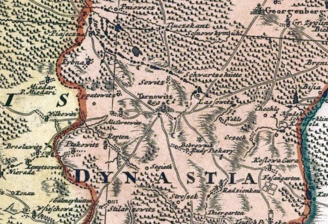 Ziemia tarnogórska na fragmencie mapy księstwa opolskiego autorstwa Iohannesa Wolfganga Wielanda z 1736 roku